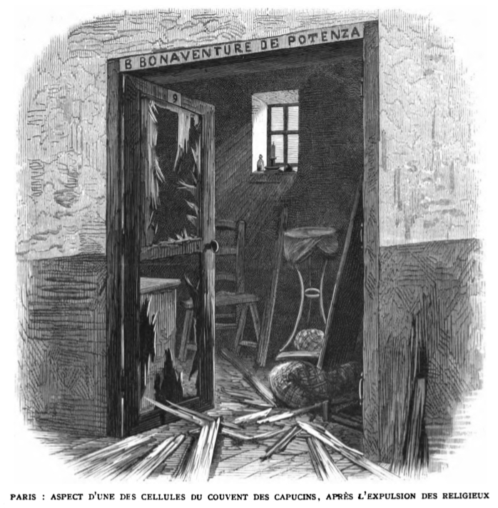 Expulsion des Capucins de Paris ; illustration de l'état des cellules après le passage de la police.